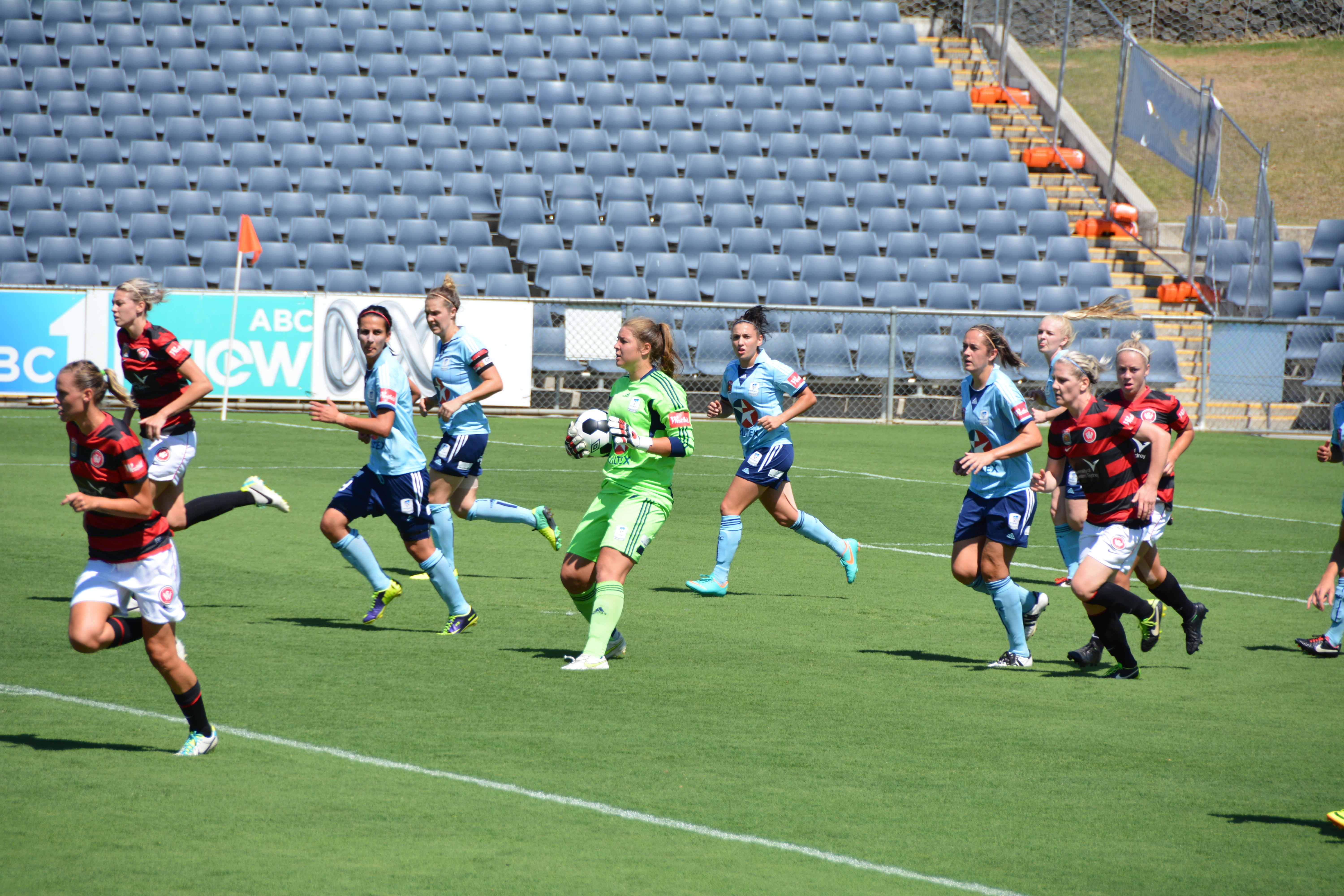 WSW v Sydney FC